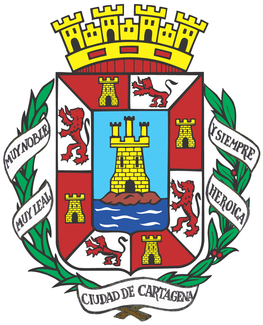 Escudo de la ciudad de Cartagena (España).